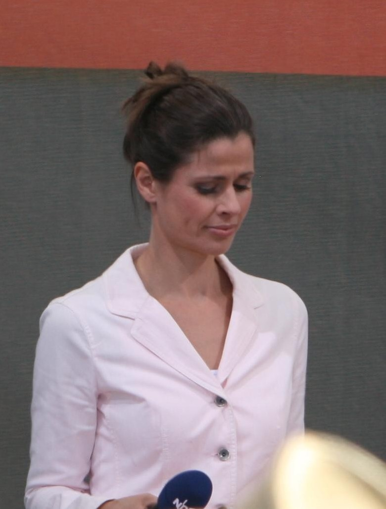 Empfang der Olympioniken 2012 in Hamburg